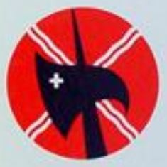 Logo Gotthardbund, Schweiz